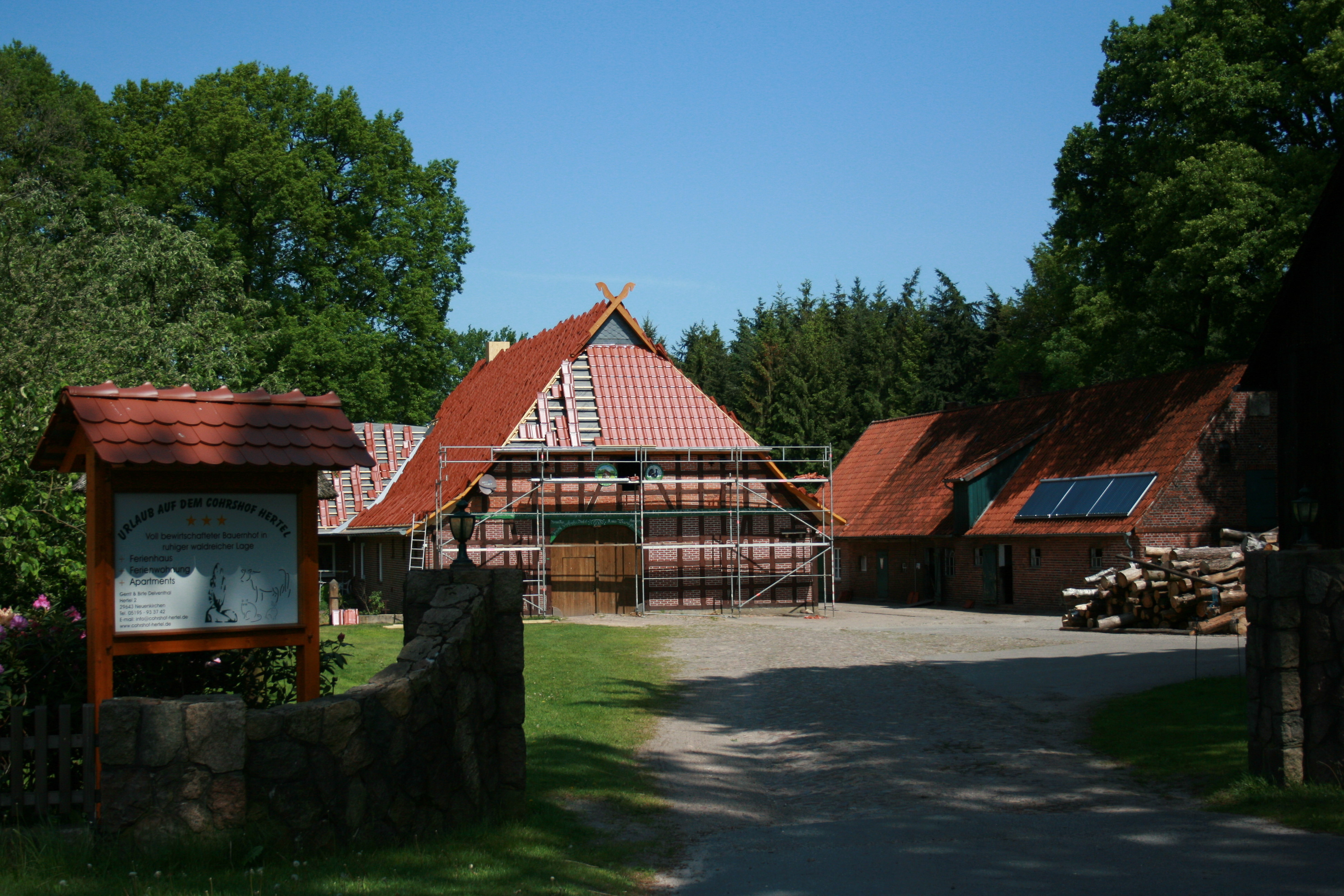 Herteler Straße in Neuenkirchen (Lüneburger Heide)